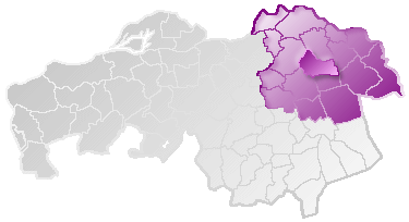 Het verzorgingsgebied van het regionale centrum van Uden